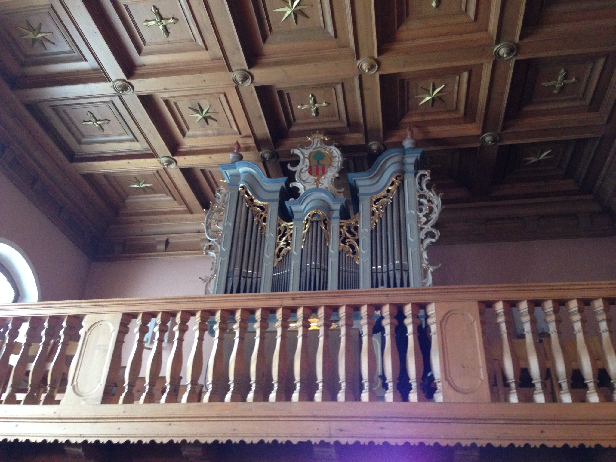 Orgel in der reformierten Kirche in Igis GR